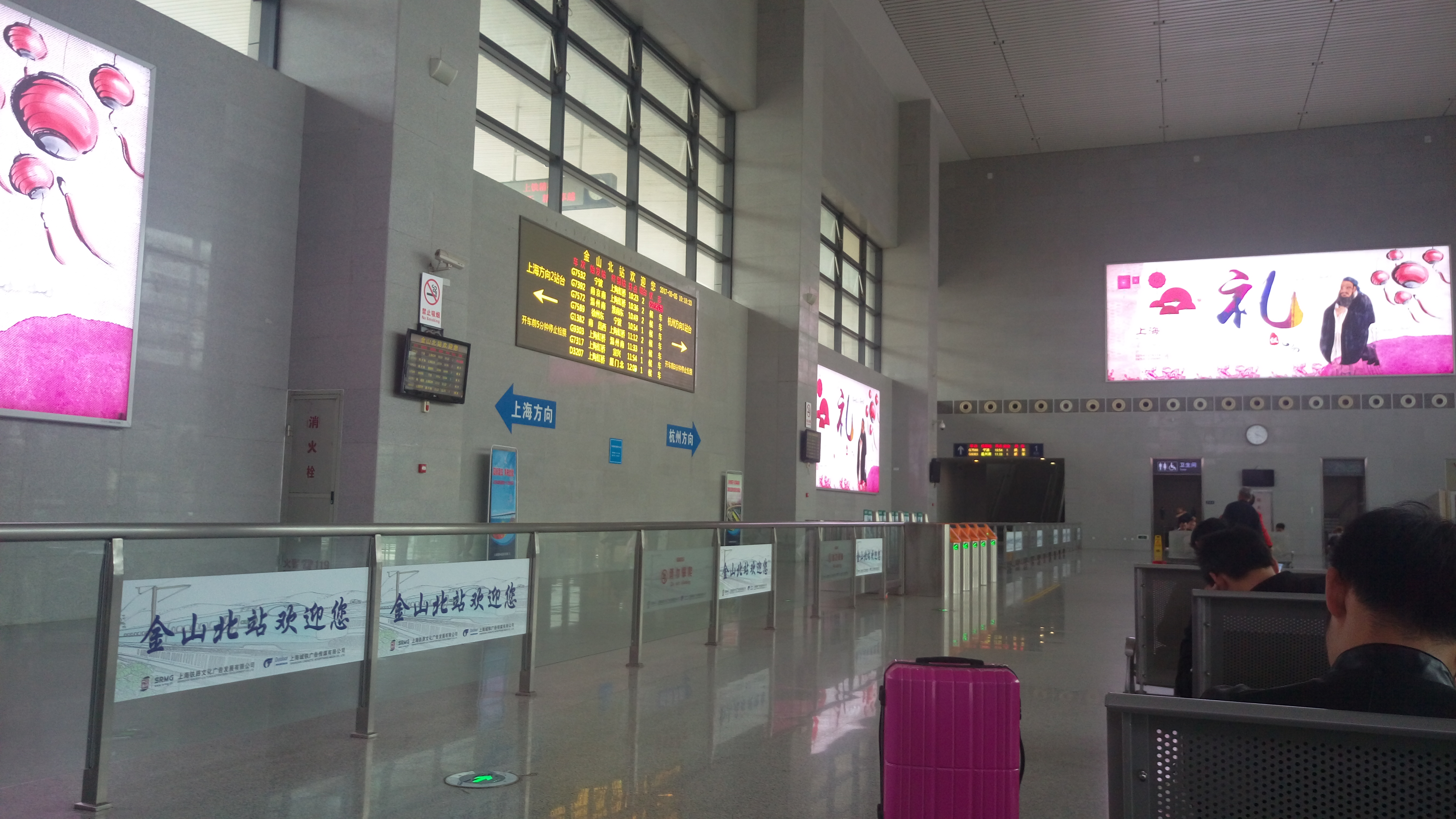 金山北站